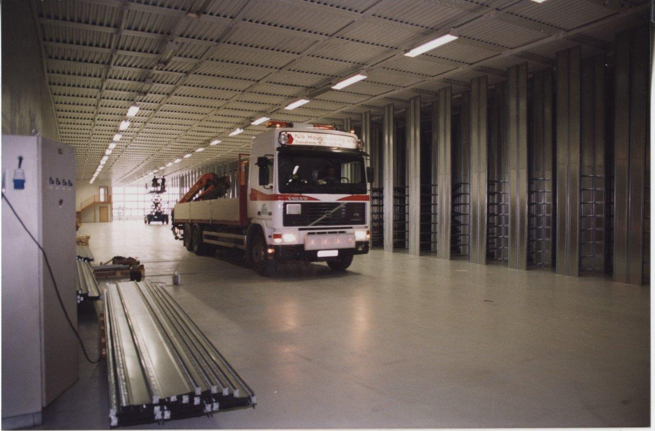 Fra innredningen av Dora-biblioteket, et av NTNU UBs 11 bibliotek, i u-båtbunkeren DORA, Trondheim.